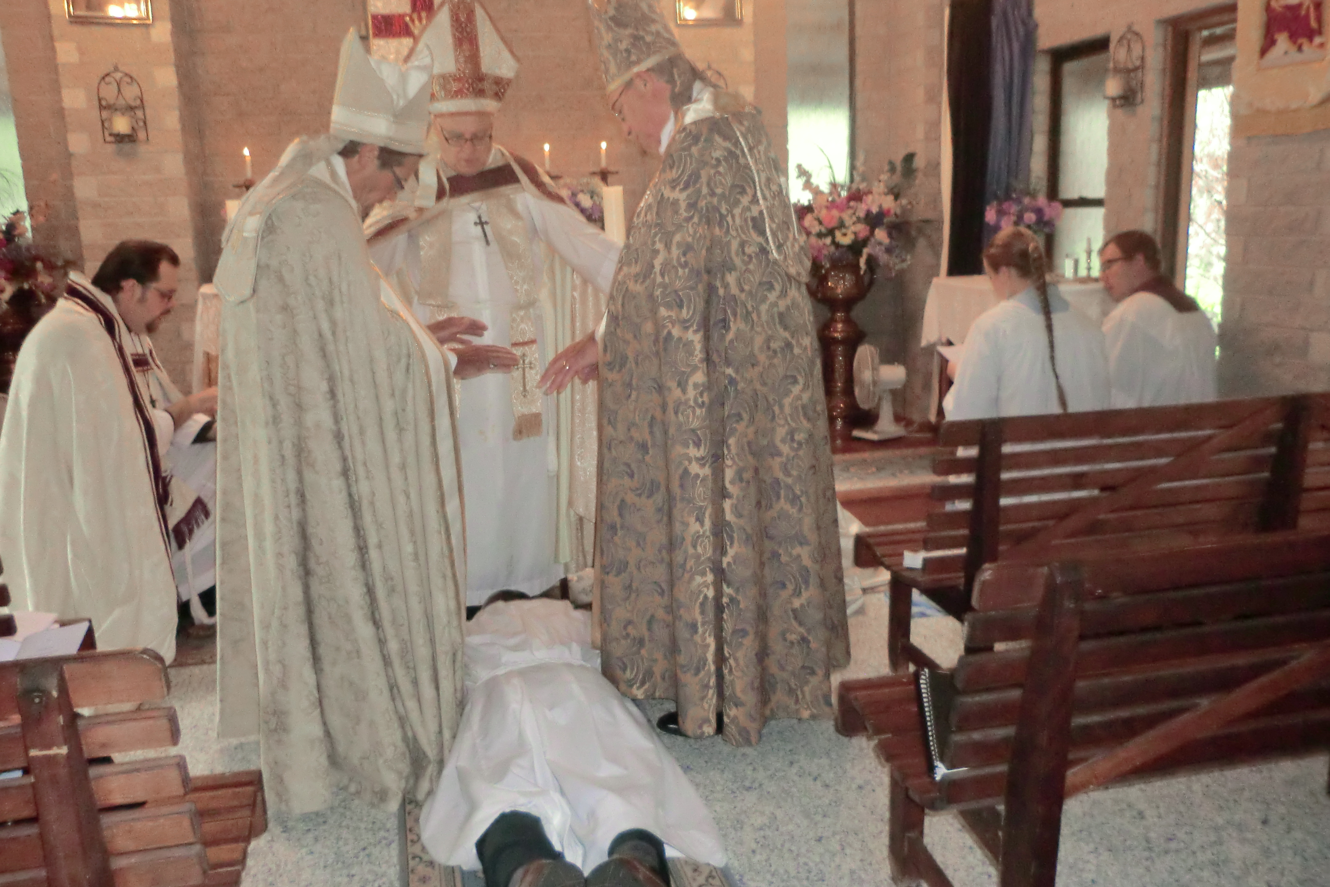 Pentahbisan Rm Nicholas di jenjang Uskup oleh Fr John Reginald Cuffe dibantu oleh 2 orang Uskup lainnya